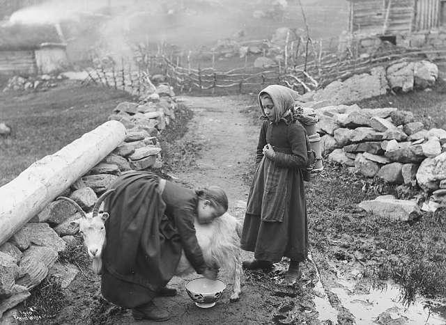 ei jente mjølkar ei geit medan ei anna jente ser på. Bollen ho mjølkar i kan vere laga ved Egersunds Fayancefabrik (usikkert). Truleg i Oddadalen (usikkert)